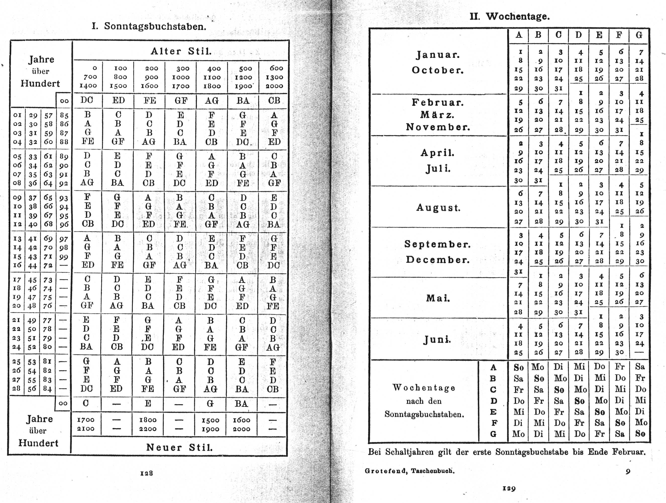 Wochentage-Ermittlung nach Grotefend